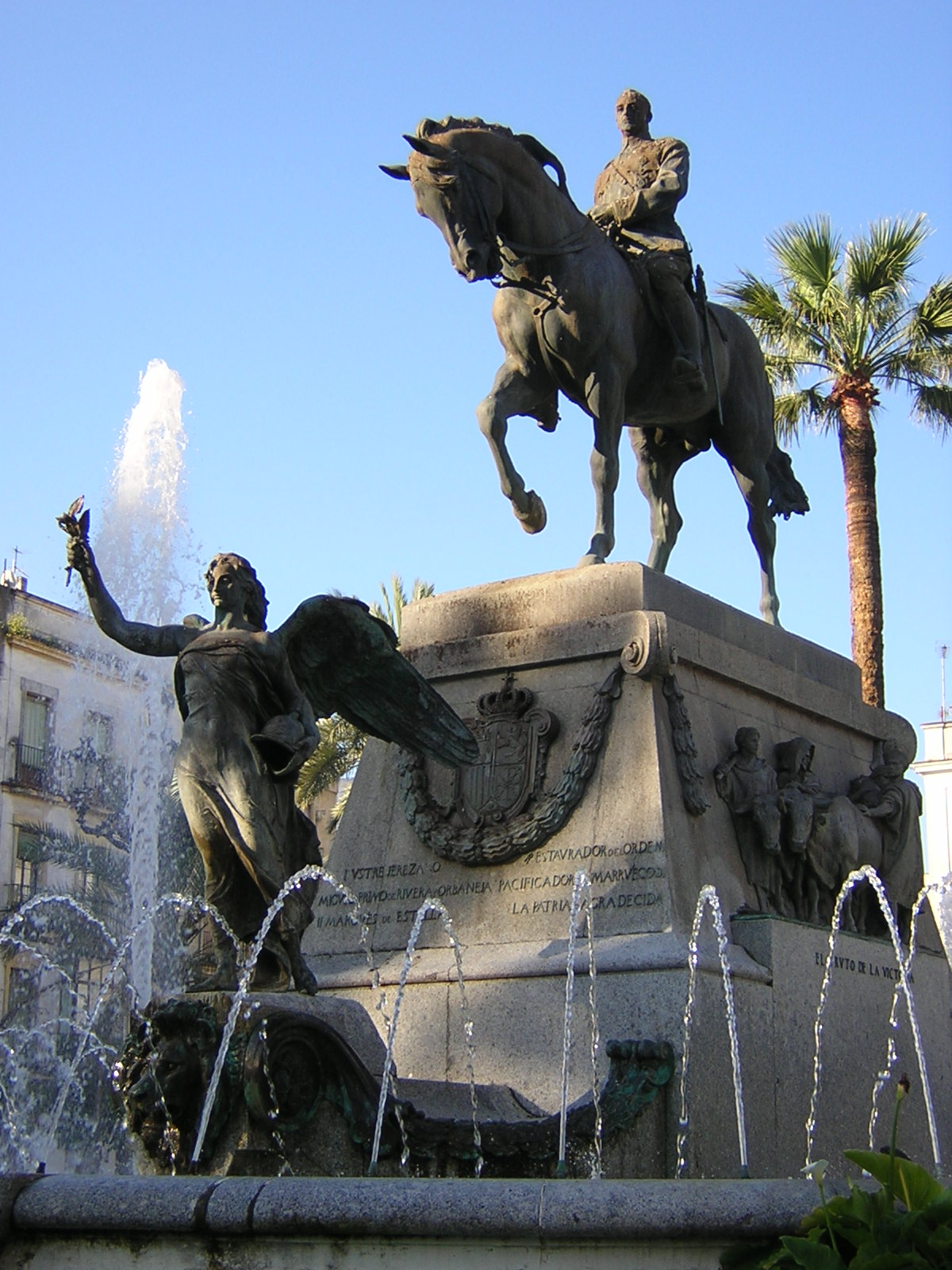 Monumento a Miguel Primo de Rivera (1929) (Plaza del Arenal, Jerez de la Frontera, España)